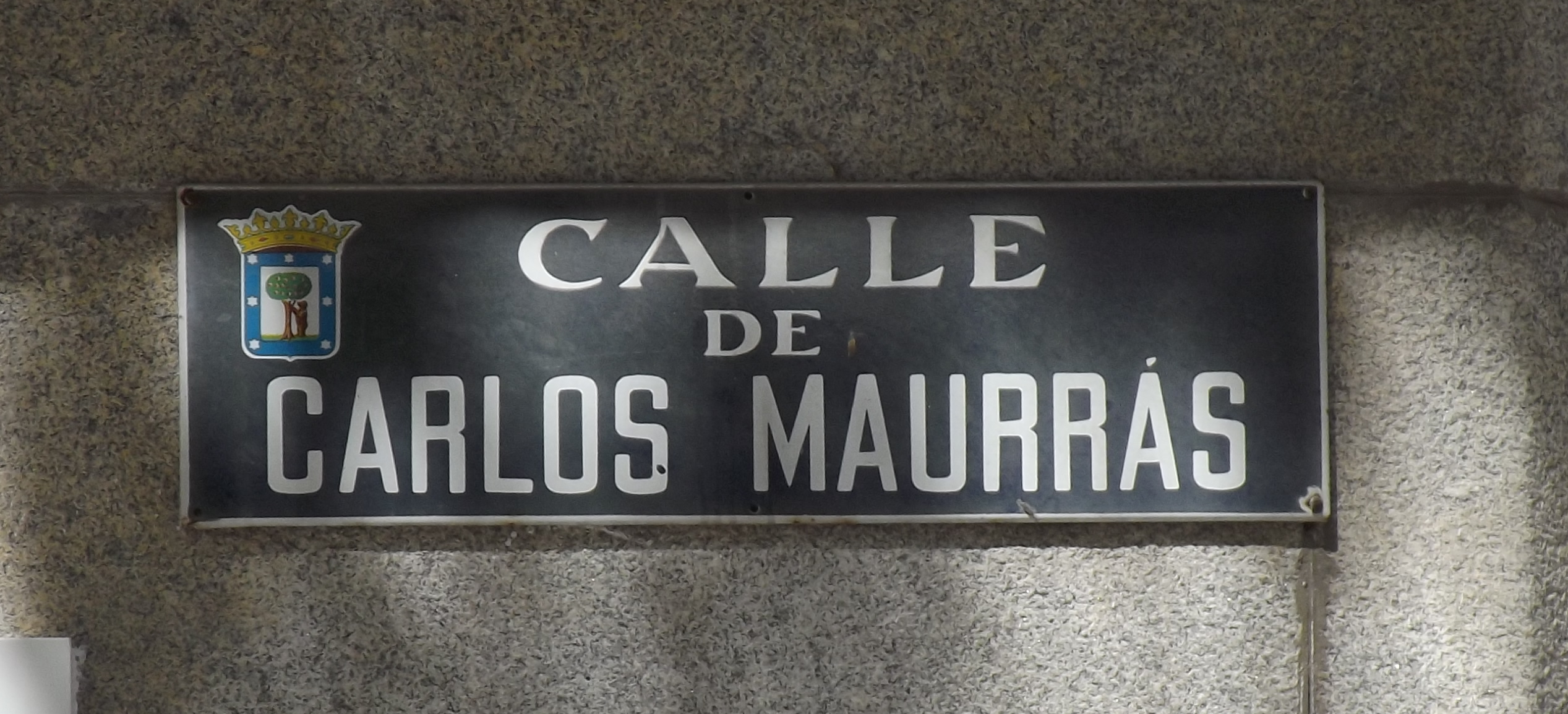 Rótulo de la calle Charles Maurras, Madrid.